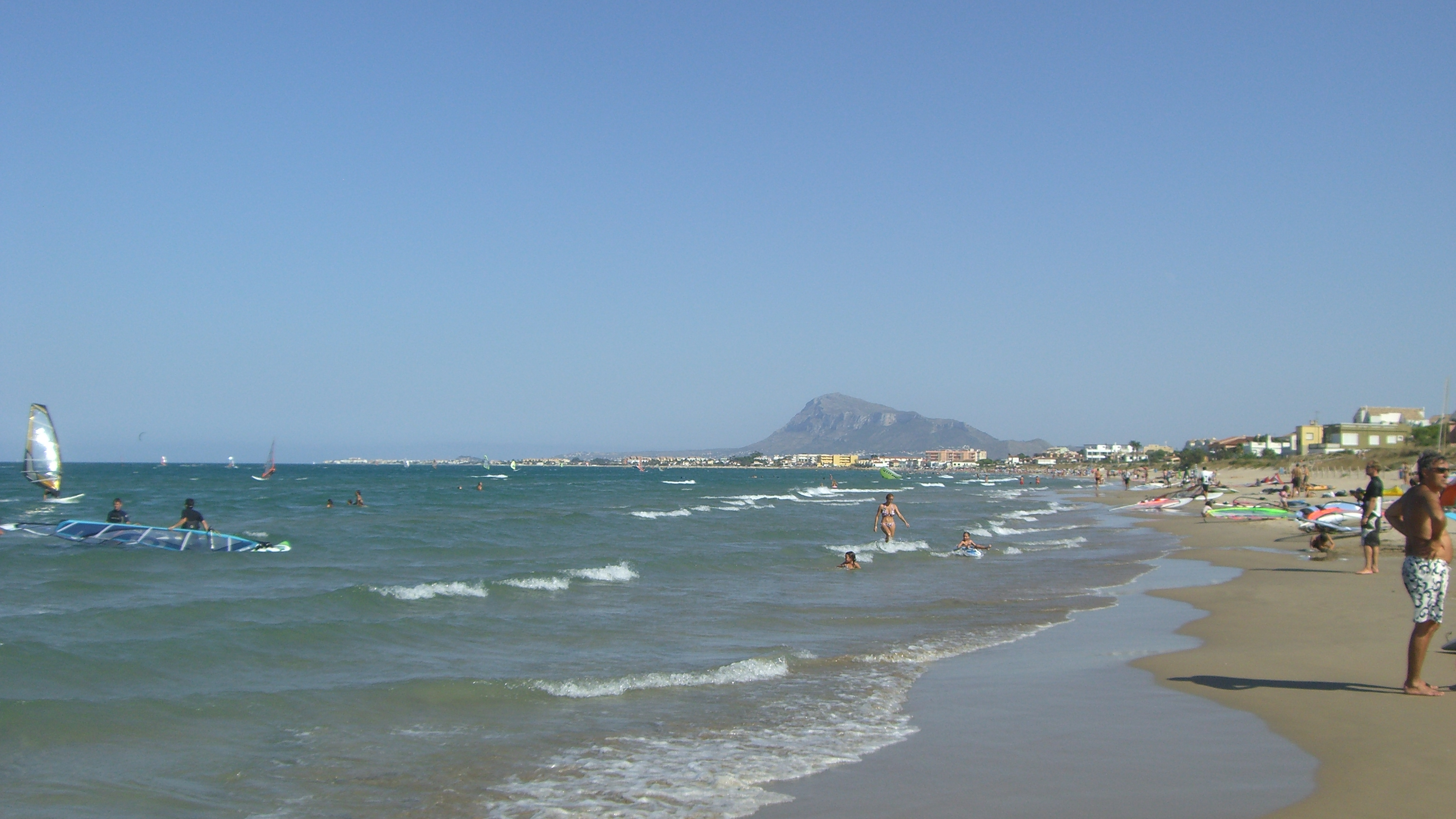 Platja de les Deveses, Dénia